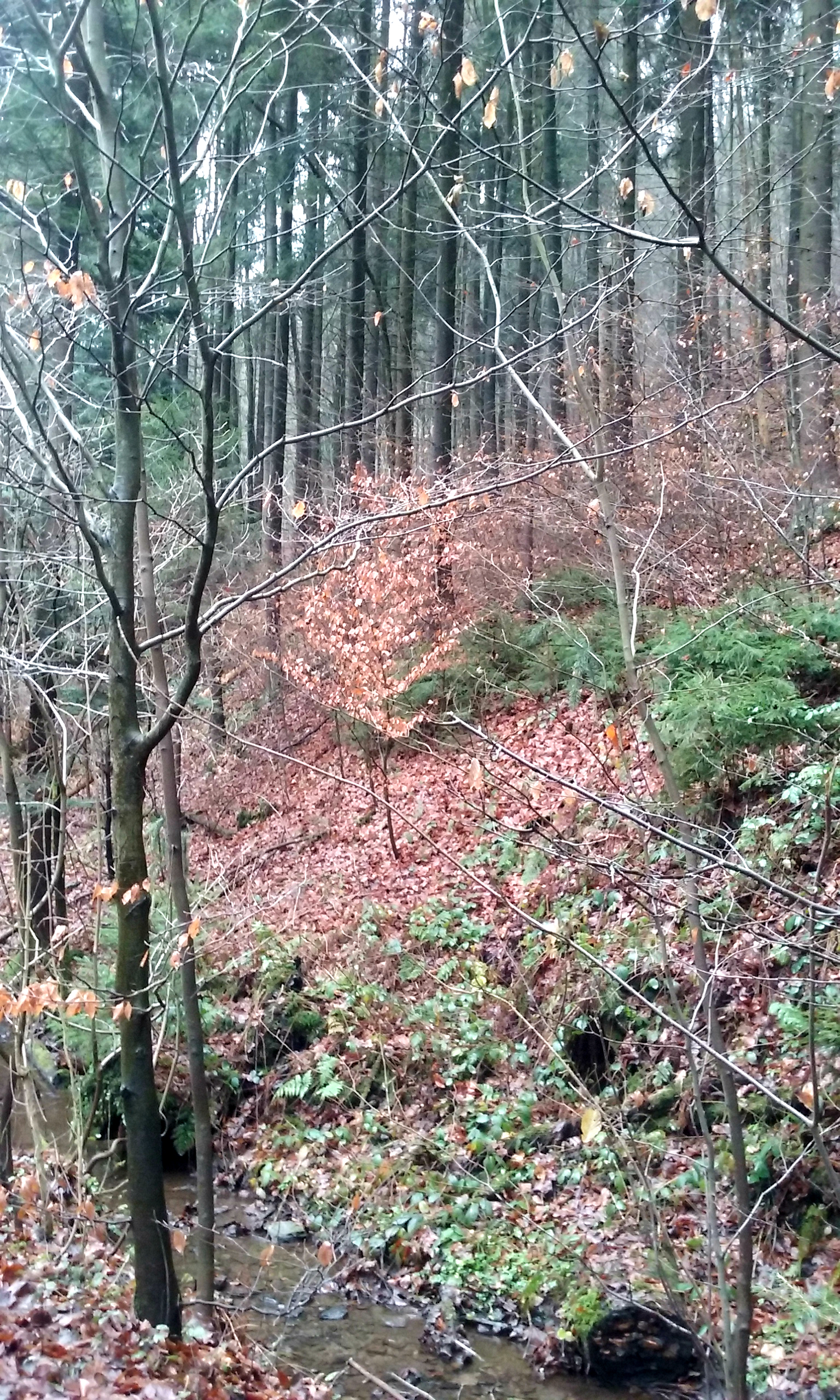 Smíšený porost